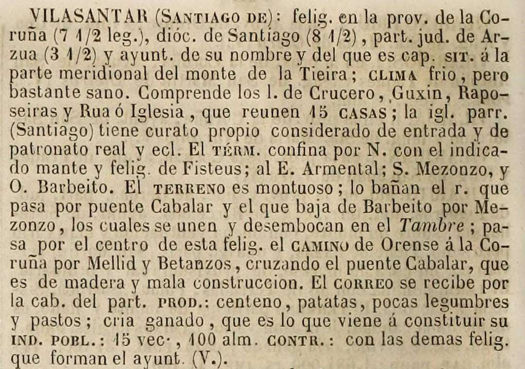 Vilasantar no Diccionario geográfico-estadístico-histórico de España y sus posesiones de Ultramar.